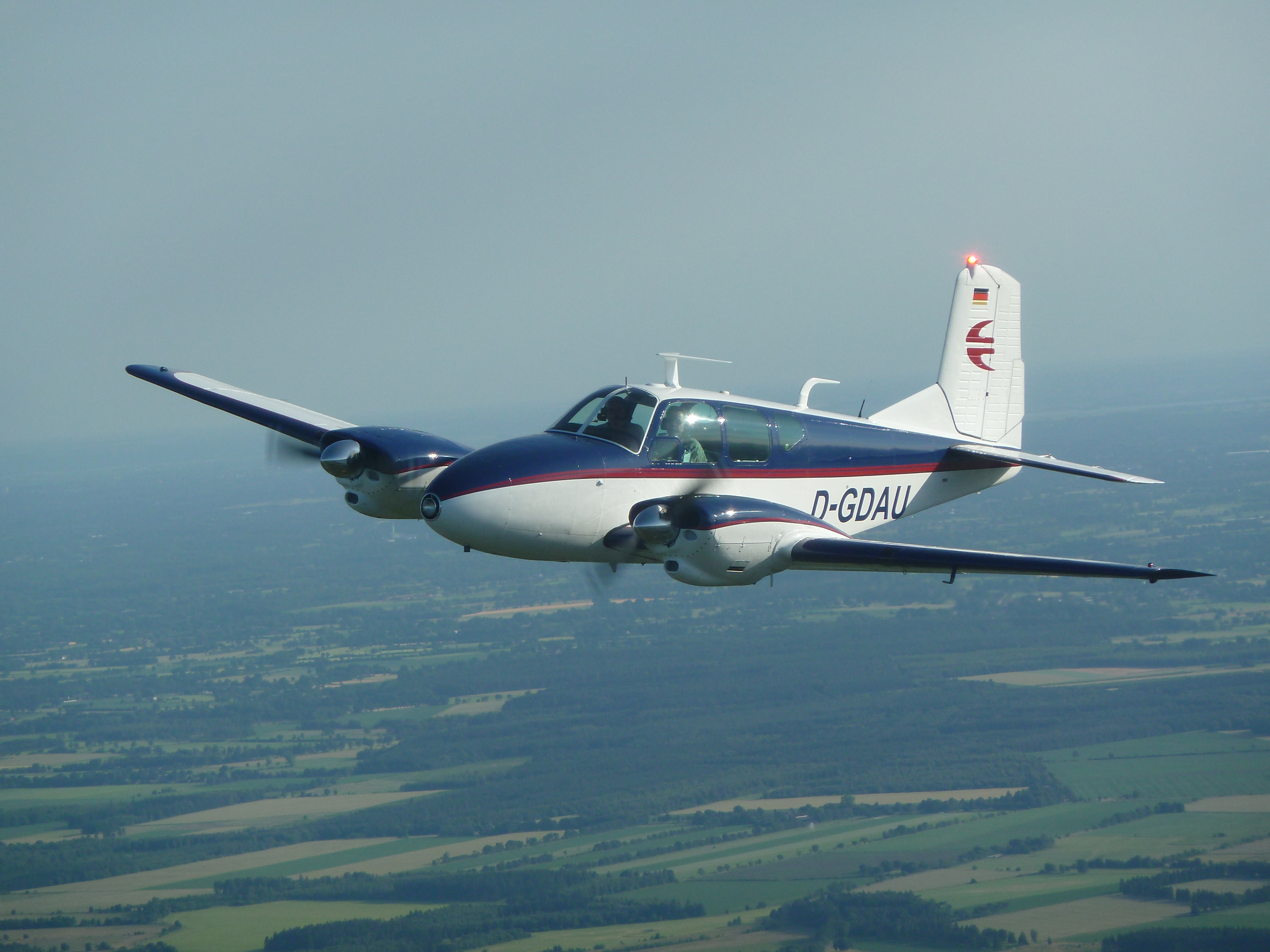 Ur-Modell Beechcraft BE95 Travel Air von 1959